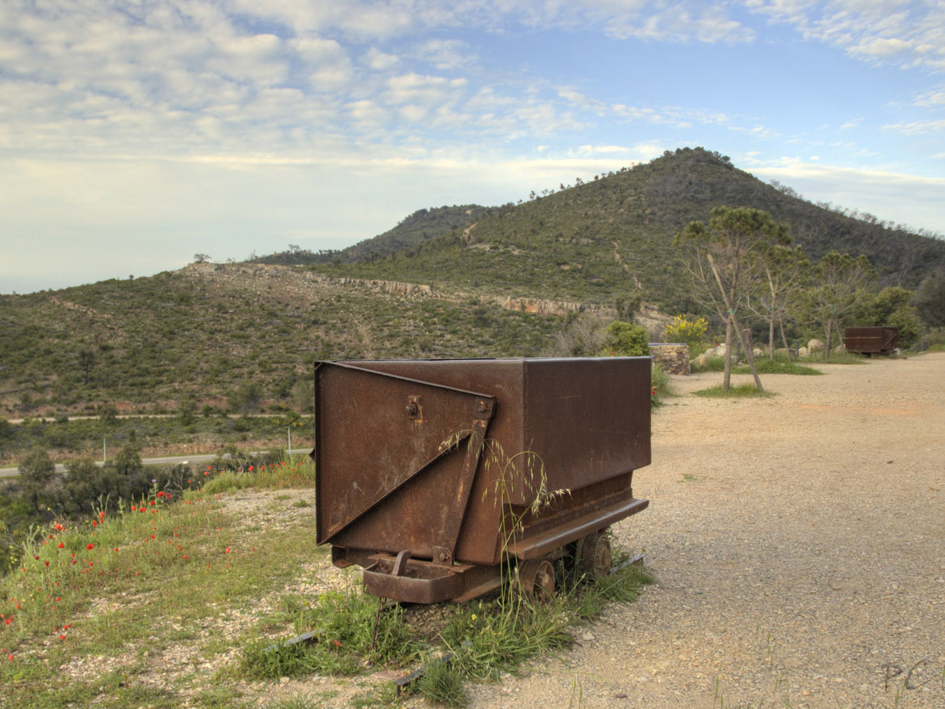 Wagonnet devant la mine de cuivre du Pradet.